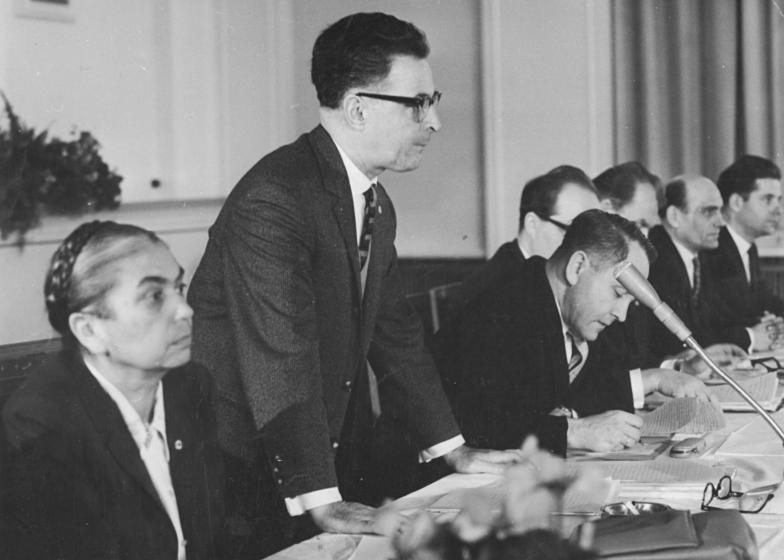 Zentralbild-Junge 6.12.1962 Grundsätze für Staatsratserlaß über Rechtspflege zur Diskussion unterbreitet. Die vom Staatsrat der DDR eingesetzte Kommission zur Ausarbeitung weiterer Maßnahmen für die Vervollkommnung der sozialistischen Rechtspflege übergab der Öffentlichkeit am Vormittag des 6.12.62 auf einer Pressekonferenz im Amtssitz des Staatsrates in Berlin-Niederschönhausen die Grundsätze des Entwurfs eines Erlasses des Staatsrates über die grundsätzlichen Aufgaben und die Arbeitsweise der Organe der Rechtspflege. Die von der Kommission ausgearbeiteten Grundsätze für den Entwurf dieses Staatsratserlasses waren vom Staatsrat der DDR auf seiner 25. Sitzung am 5.12.62 als Diskussionsgrundlage bestätigt worden. Sie werden der Bevölkerung der DDR zur öffentlichen Aussprache und Beratung unterbreitet. UBz: Während der Pressekonferenz v.l.n.r.: Dr. Hilde Benjamin, Minister für Justiz der DDR, Generalstaatsanwalt Josef Streit und Dr. Toeplitz, Präsident des Obersten Gerichts der DDR.